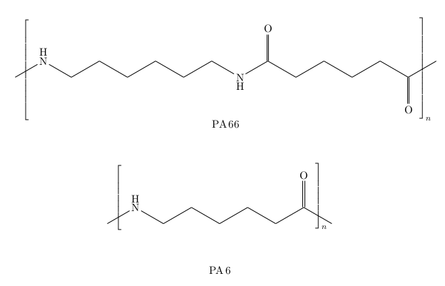 Strukturformeln von PA 6 & PA 6.6.